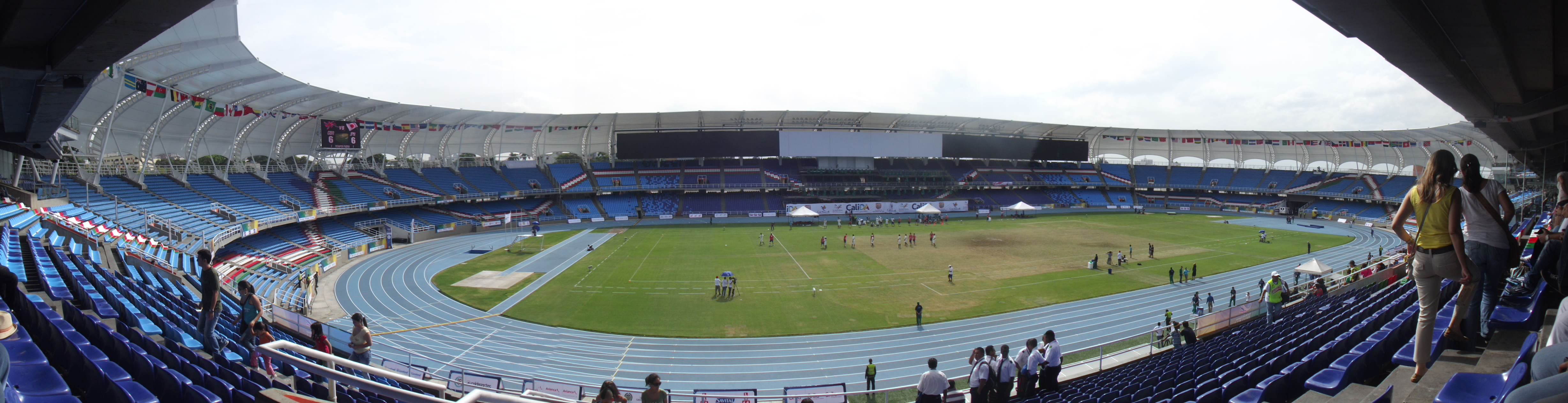 Ultimate en los Juegos Mundiales Cali 2013 en el Estadio Olímpico Pascual Guerrero